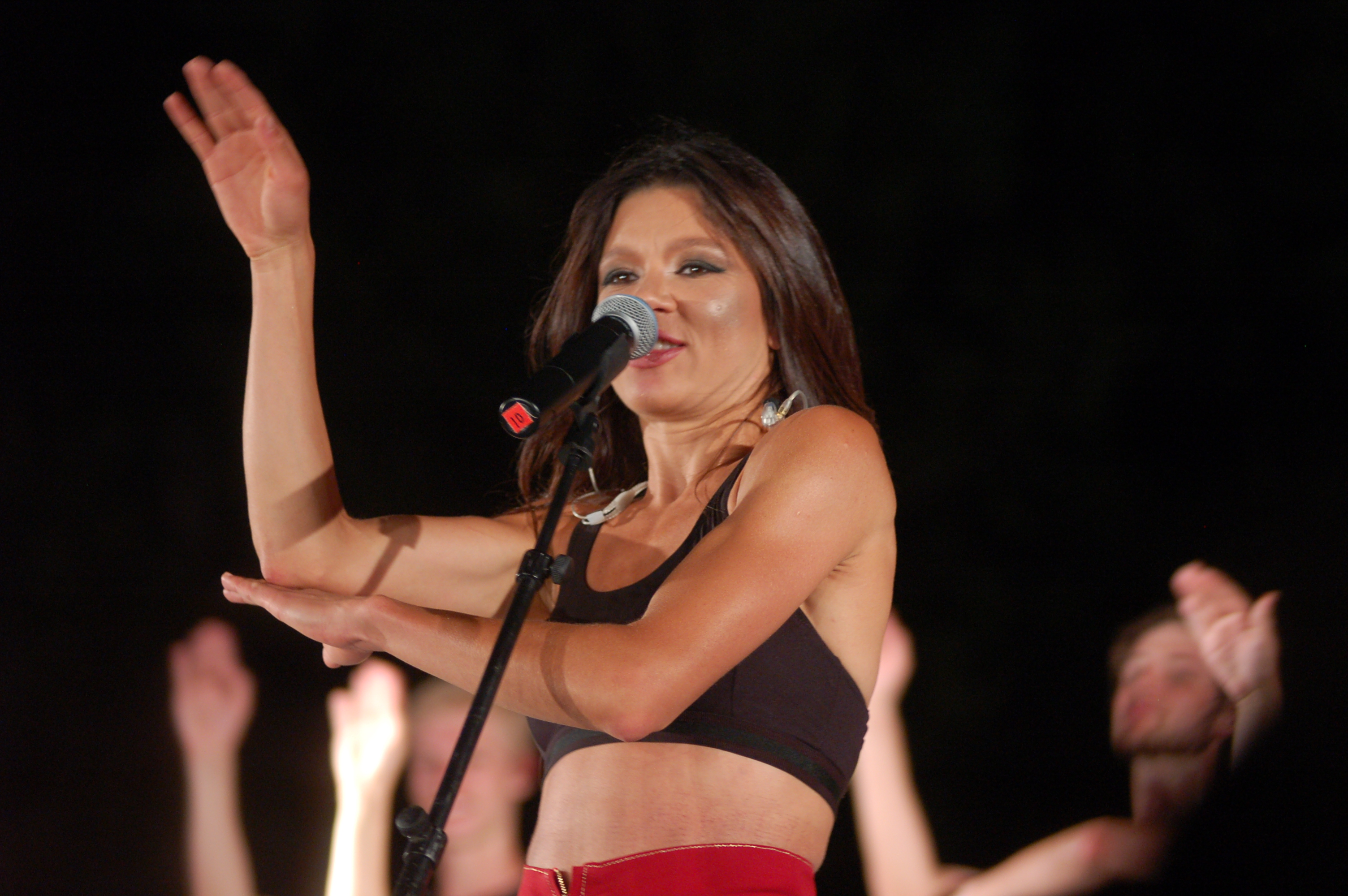 Ruslana in Soyuzivka Ukrainian Cultural Festival 2012